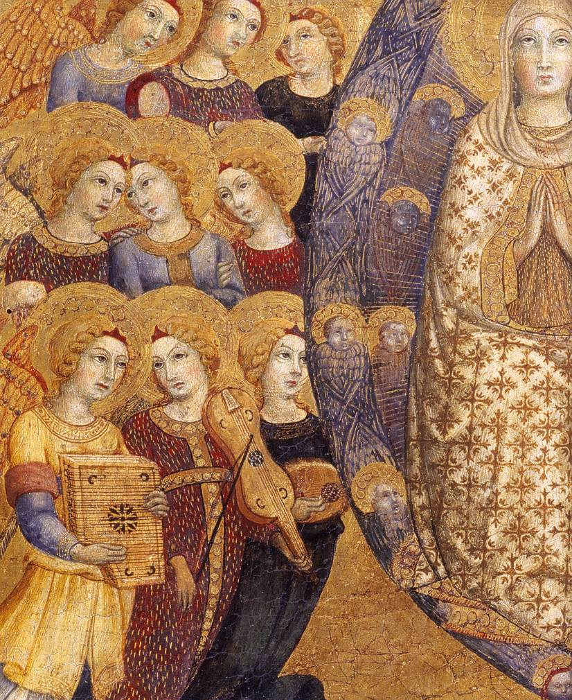 detail